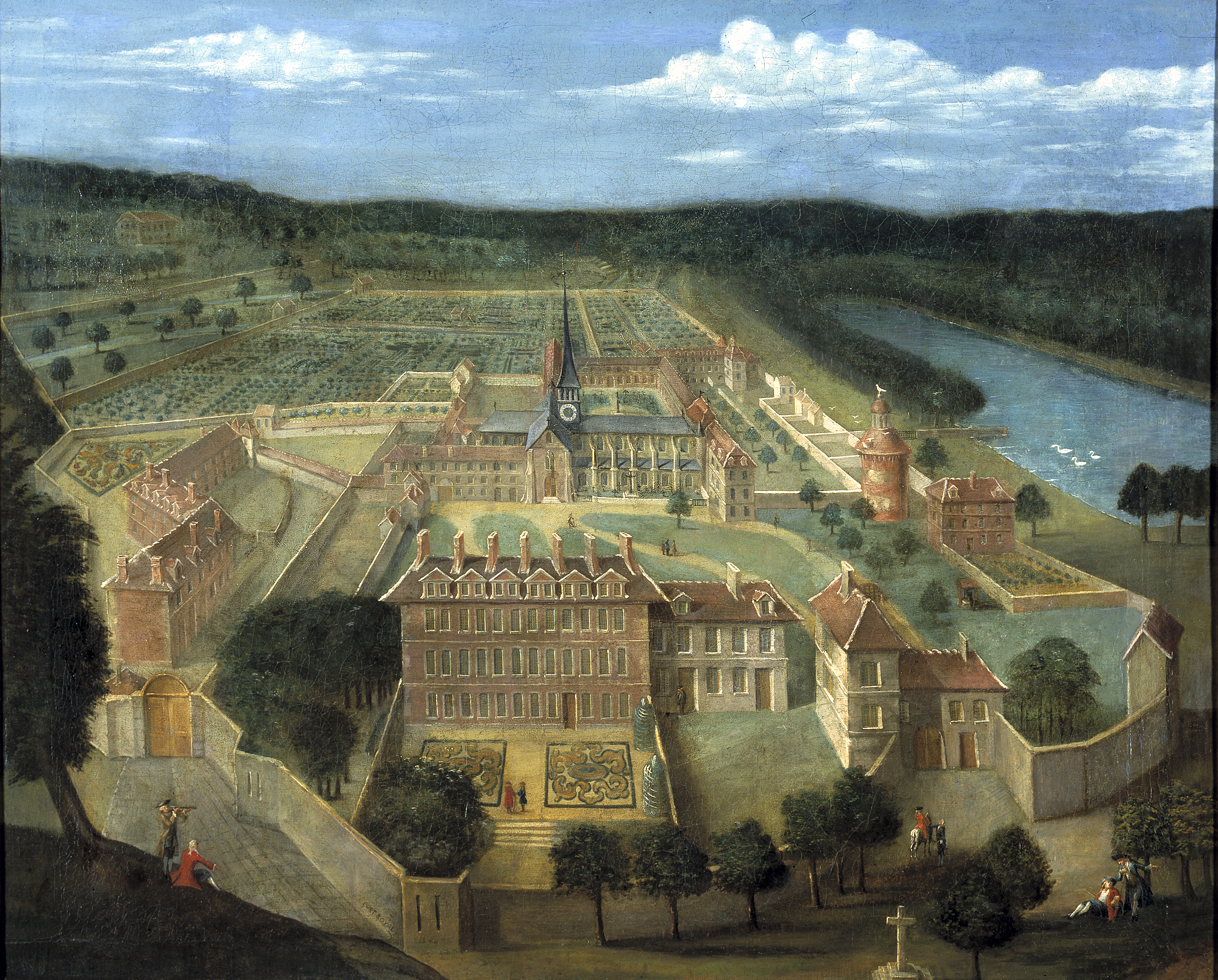 Vue générale de l'abbaye de Port-Royal-des-Champs en 1674. . Version recadrée, et convertie en .jpg, .